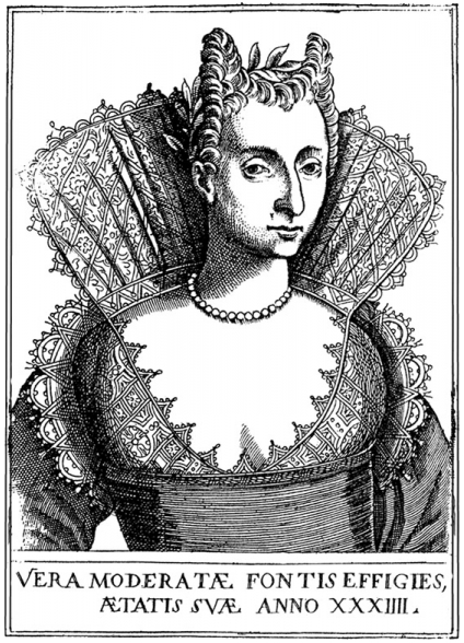 MODERATA FONTE (Modesta Dal Pozzo, 1555-1592). Il merito delle donne. Venezia, Domenico Imberti, 1600.